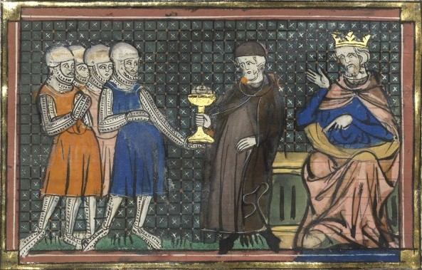 Gérard de Ridefort embauchant des troupes